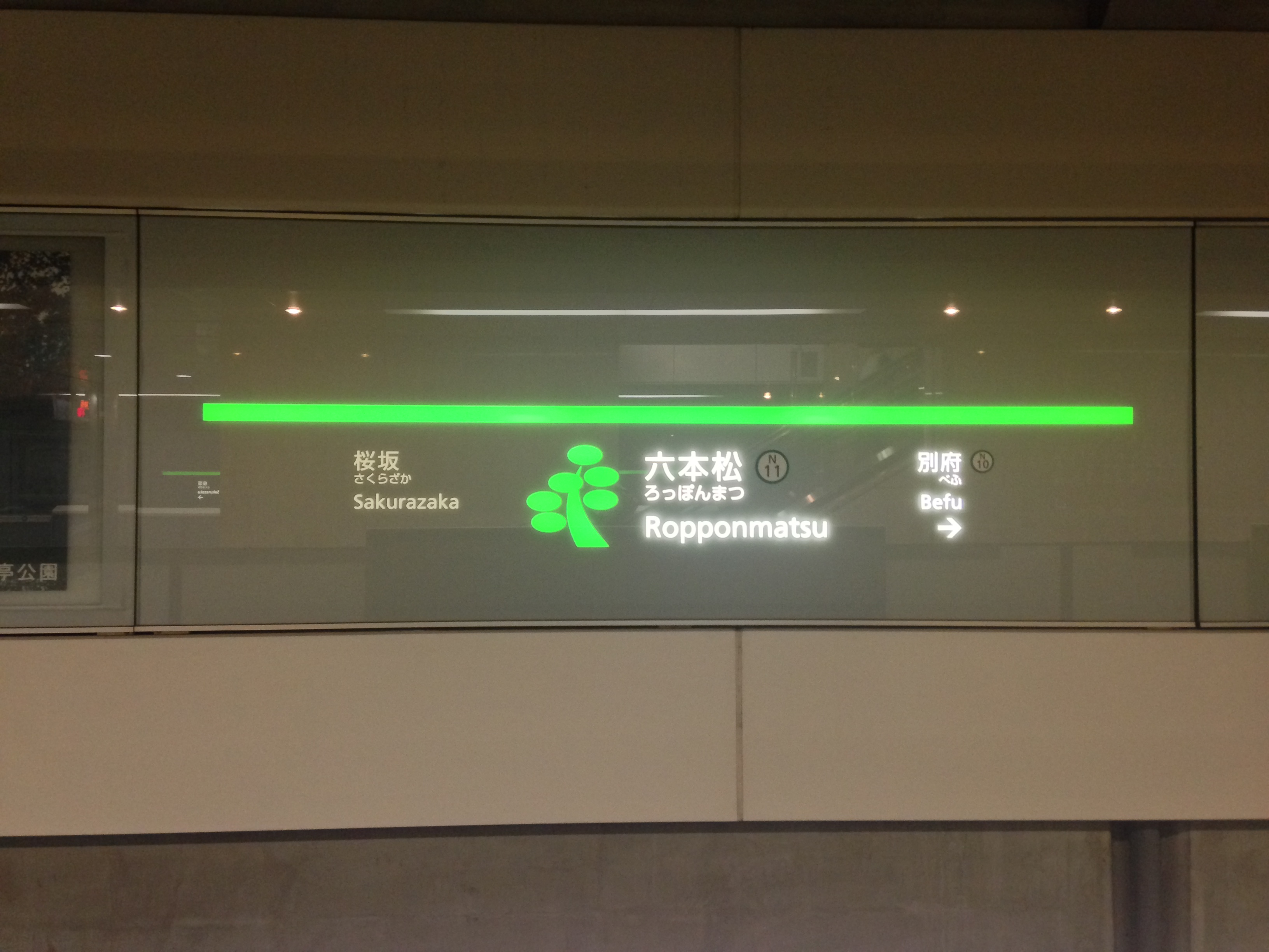 六本松駅の駅名標。イラストは「六本松」にちなんでマツ